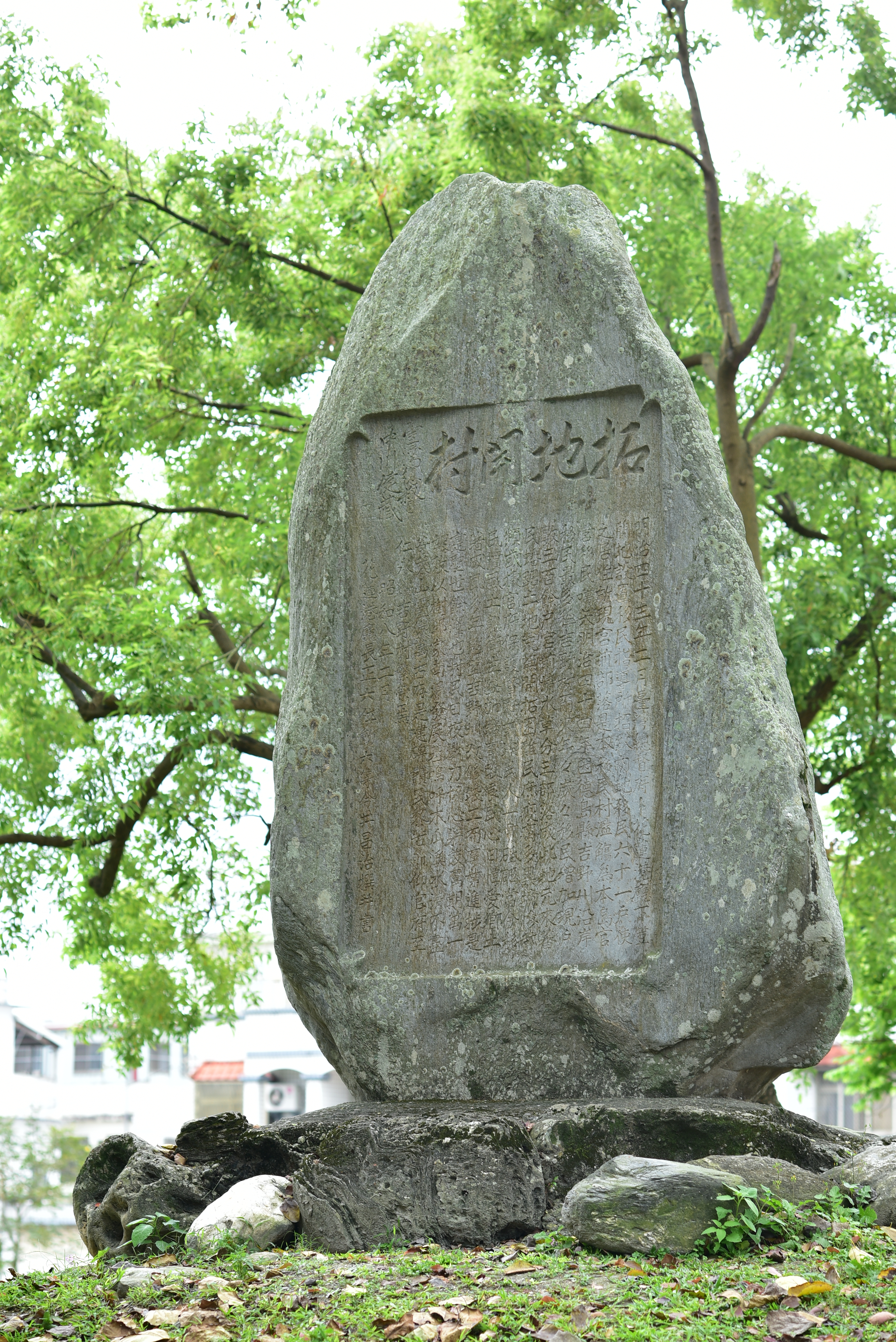 Hualien Yoshino Village 開村記念碑 2018